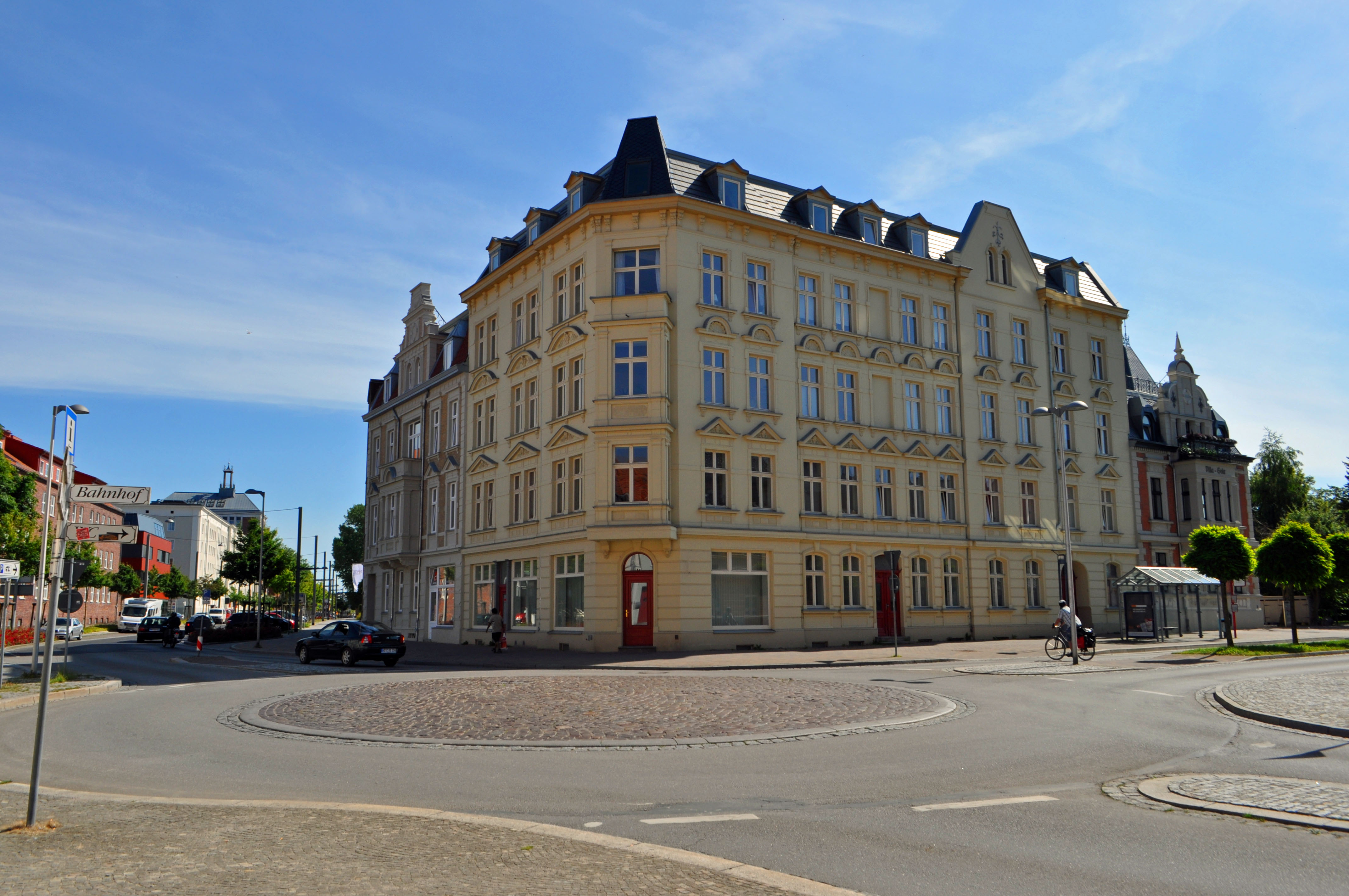 Stralsund, Wasserstraße Ecke Frankenwall und Frankendamm